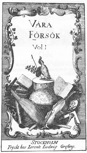 Våra försök, title page